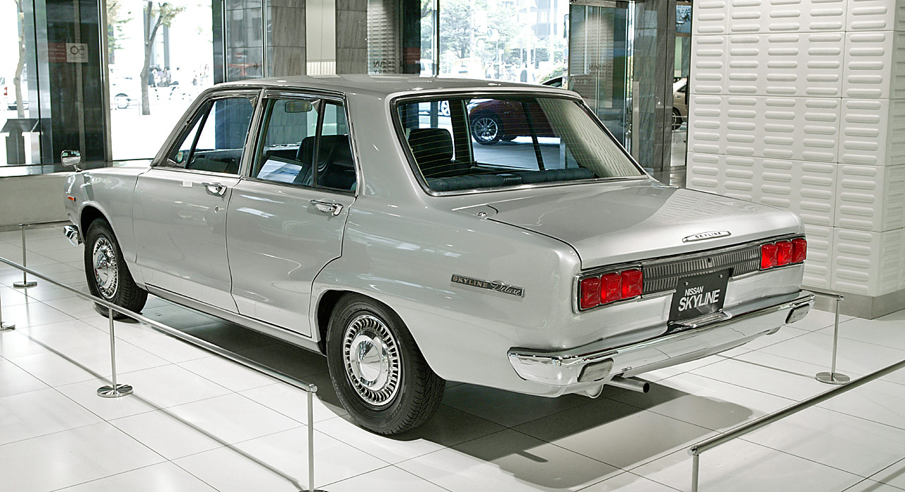 Nissan Skyline C10 Sedan 1500 Deluxe